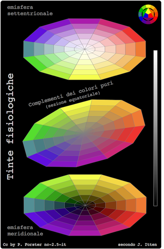 Sfera di colori ricostruita secondo J.Itten: emisfere e sezione equatoriale